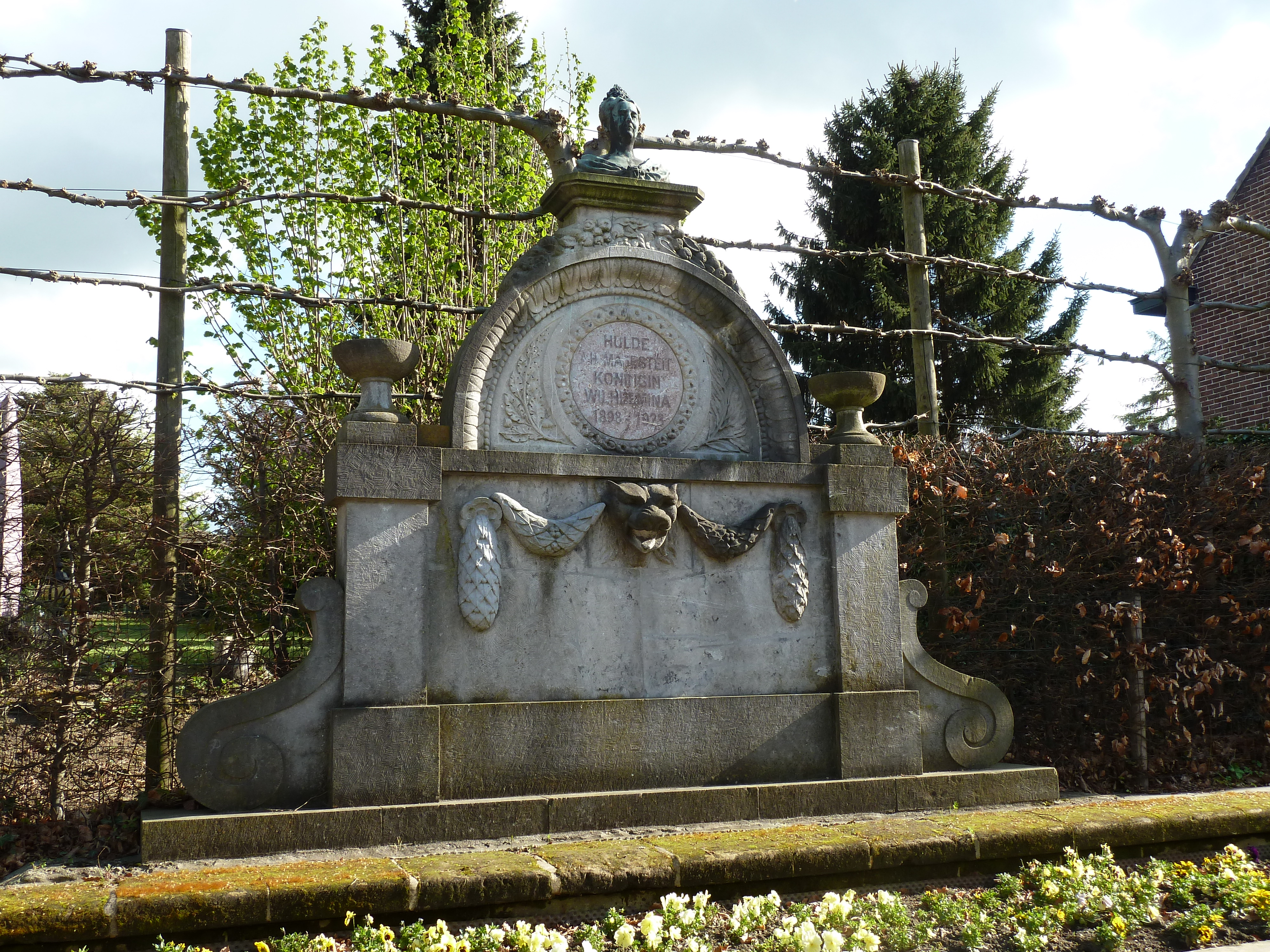 Wilhelminamonument op de Pley, Noorbeek, Limburg, Nederland